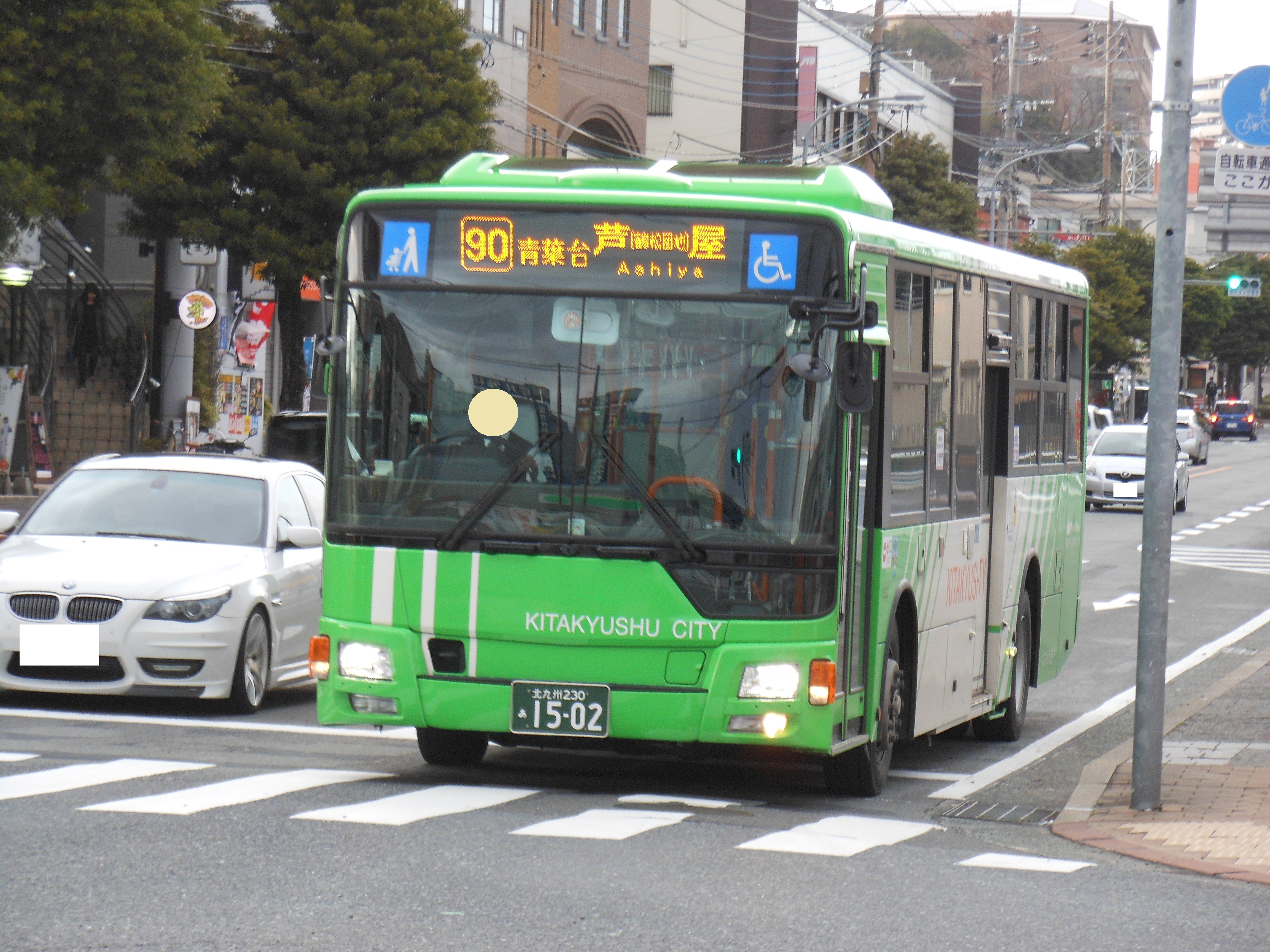 撮影日：2018年3月22日 場所：折尾四丁目交差点 2015年度に導入されたノンステップバスです。 この画像は、私自身がバストーク[1]で使用した画像です。 著作権侵害ではありません。